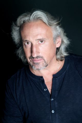 Sasvári Sándor portréja